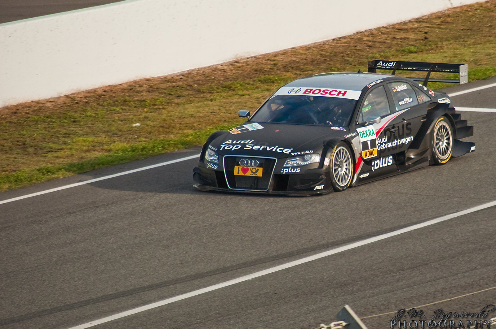 Nikon D90 + Sigma 18-200 DC OS HSM 1/1250s - F/6.3 - 200mm - ISO400